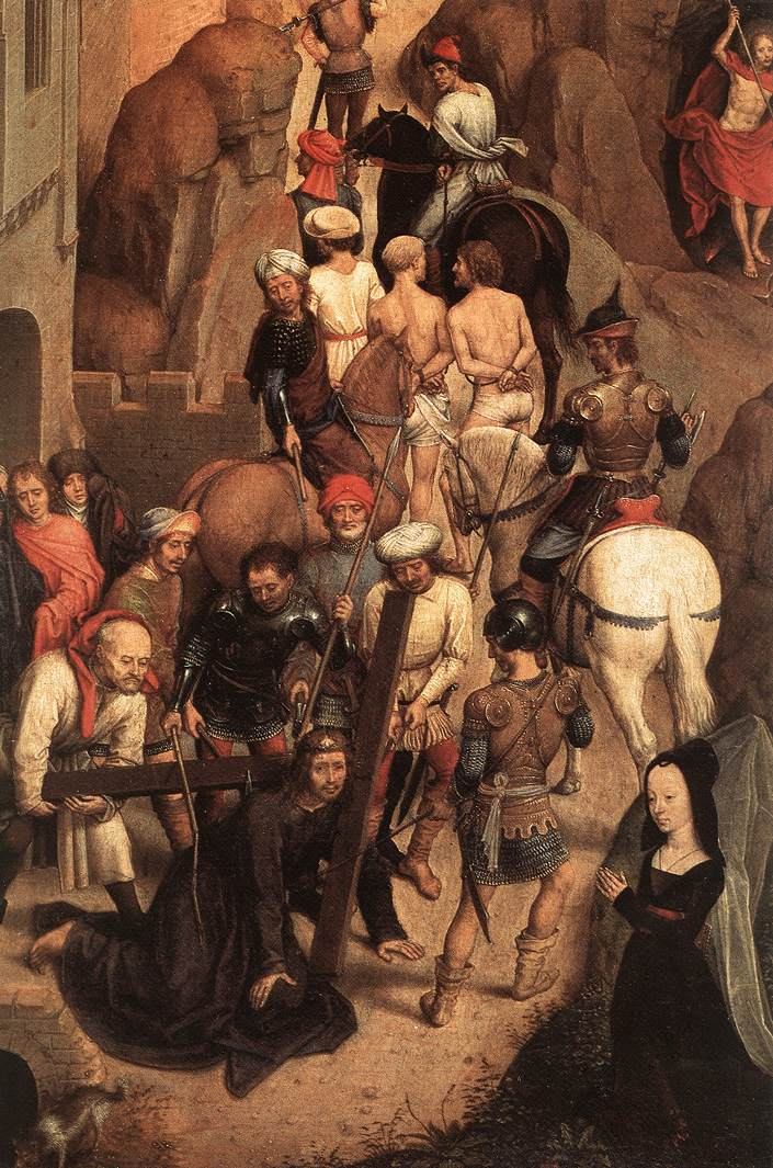 detail